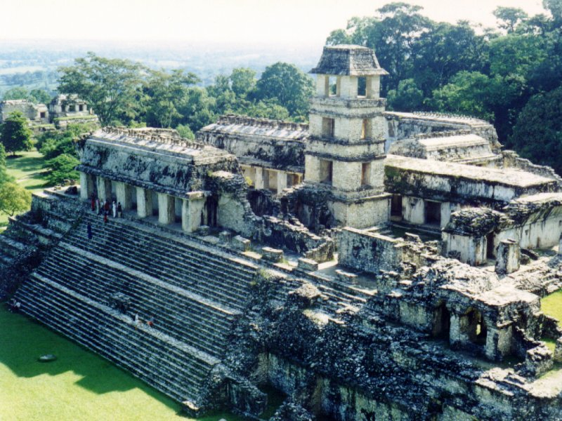 Großer Tempel in Palenque